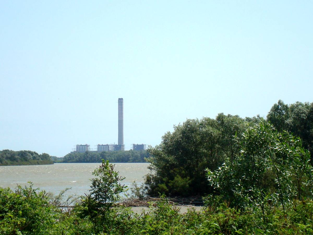 Photo de la centrale thermoélectrique de Polesine Camerini (Porto Tolle, prov.Rovigo-Italie)